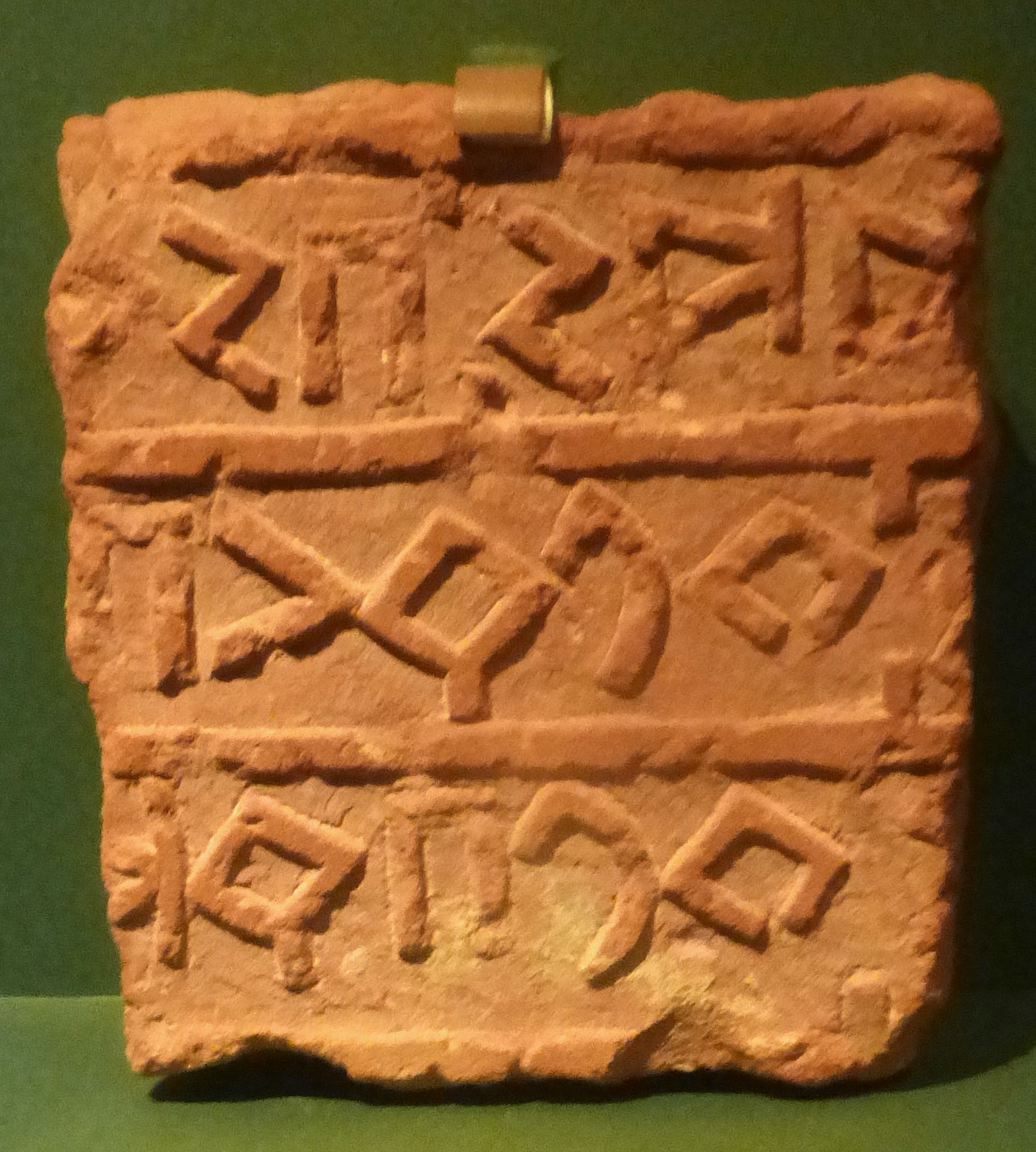 Dadanitic script on a tablet (ダーダーン文字)